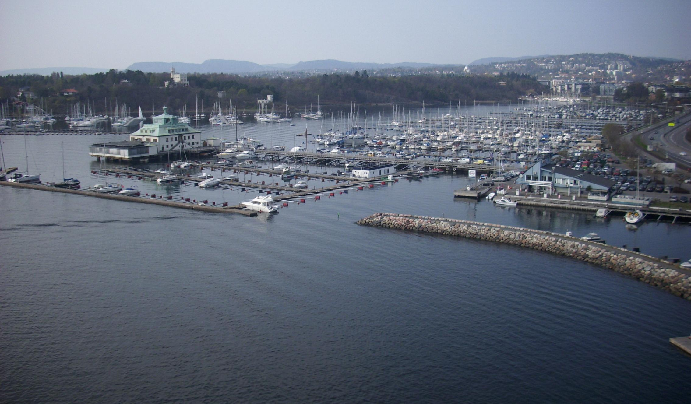 Königlicher Norwegischer Yachtklub (Kongelig Norsk Seilforening) in Oslo